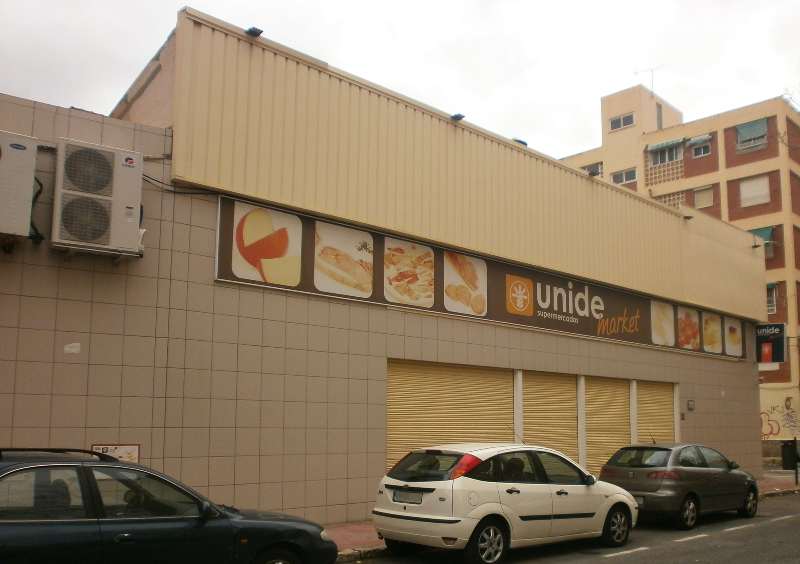 Supermercado Unide en la calle Ausó y Monzó, Alicante, España.